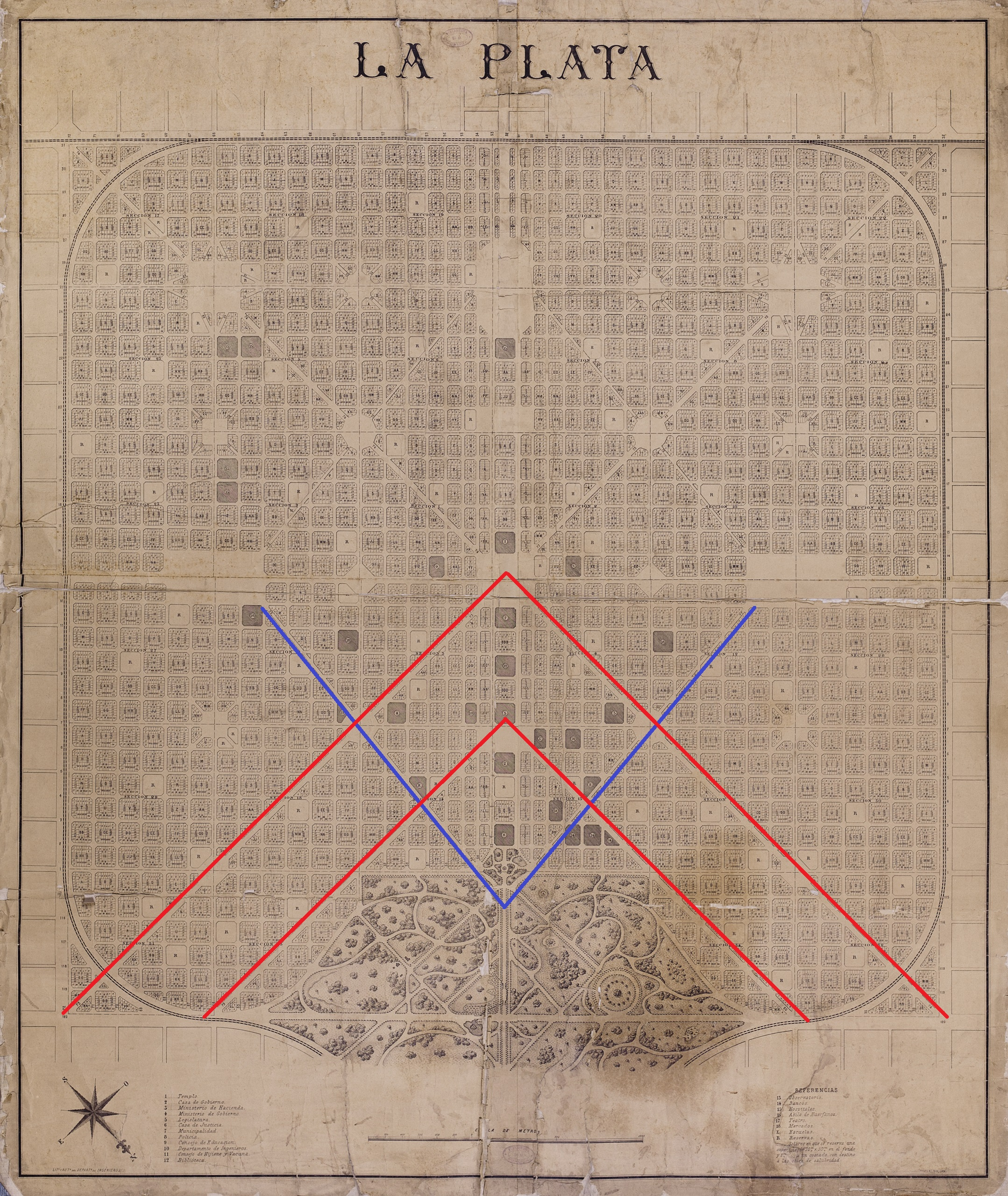 Mapa fundacional de La Plata, capital de la Provincia de Buenos Aires, donde se ven la escuadra y el compás conformadas por diferentes avenidas diagonales.